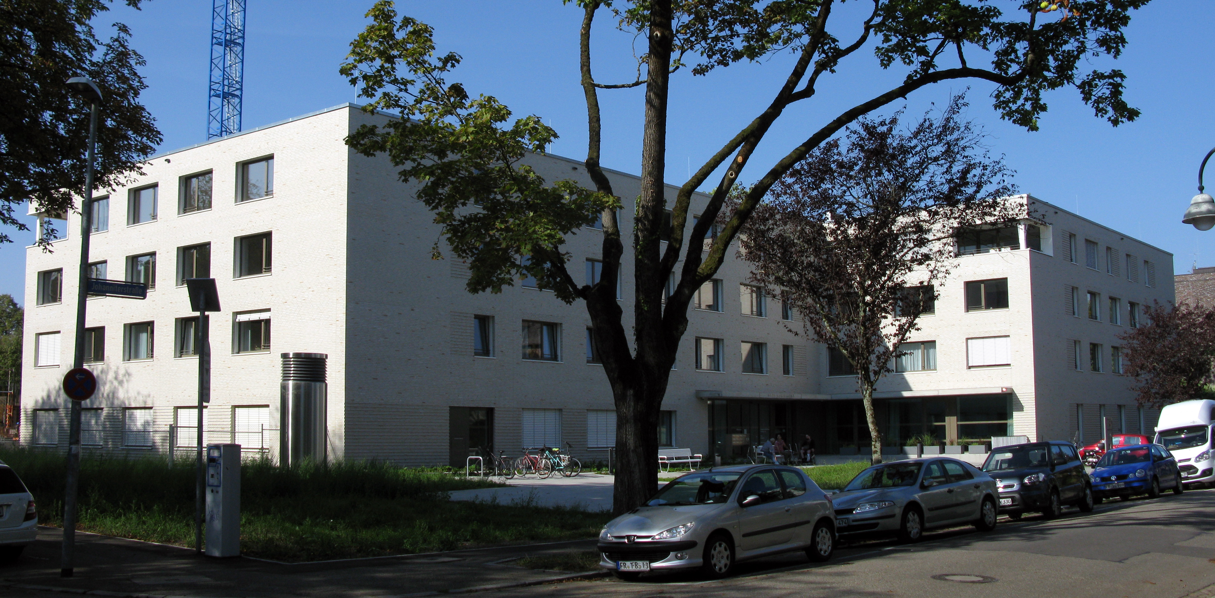 Haus Heiliggeist in Freiburg-Neuburg